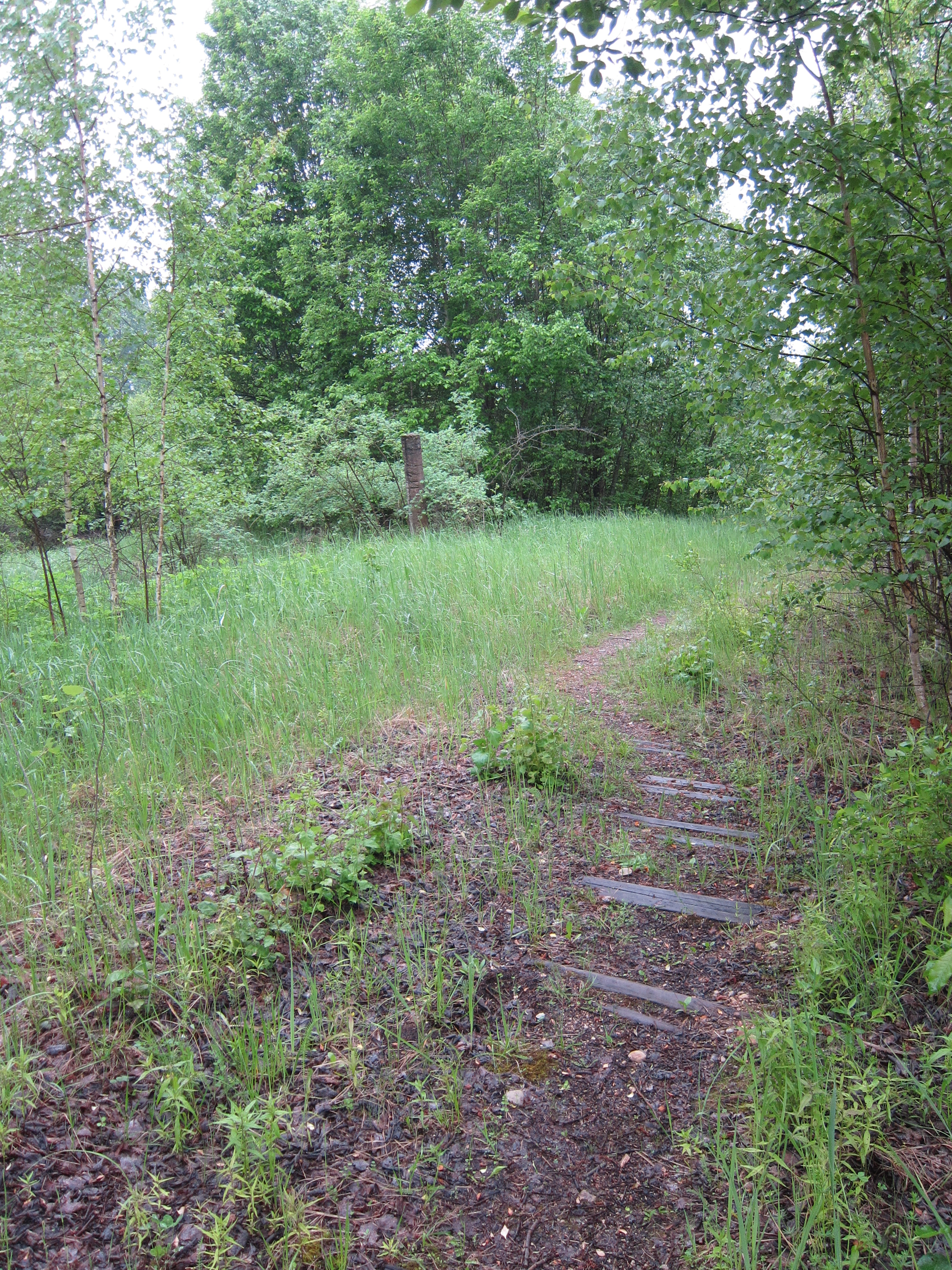 Praulienas stacija.